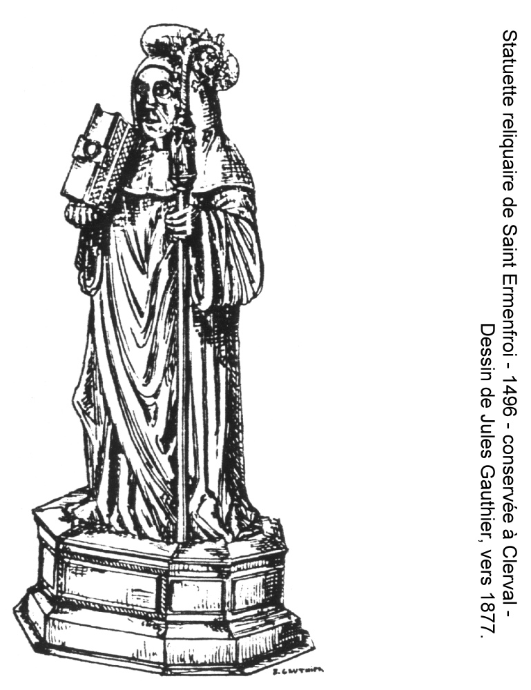 Dessin réalisé en 1877, par Jules Gauthier (1848-1905), archiviste aux archives départementales du Doubs. Il représente la statuette reliquaire de Saint-Ermenfroi, sculptée en 1496, jadis exposée dans la chapelle de Santoche, et aujourd'hui conservée dans l'église de Clerval (Doubs, France).